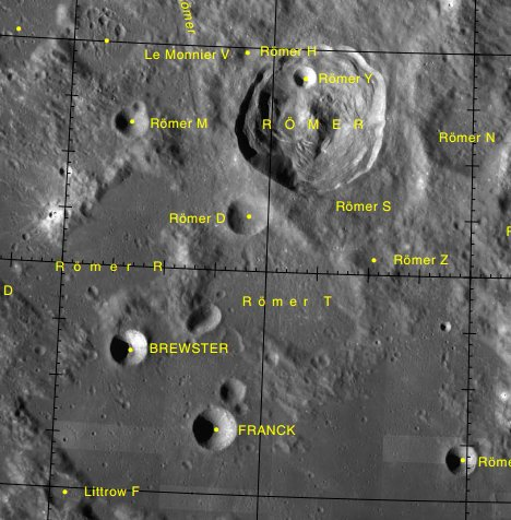 Cráter lunar Franck. Localización. (Imagen LRO)